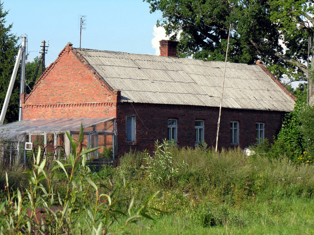 Meškeliai, Mažeikių rajonas, Viekšnių seniūnija Buvusio Meškelių dvaro kumetynas Foto: Algirdas, 2006 m. rugpjūčio 20 d., Lietuva